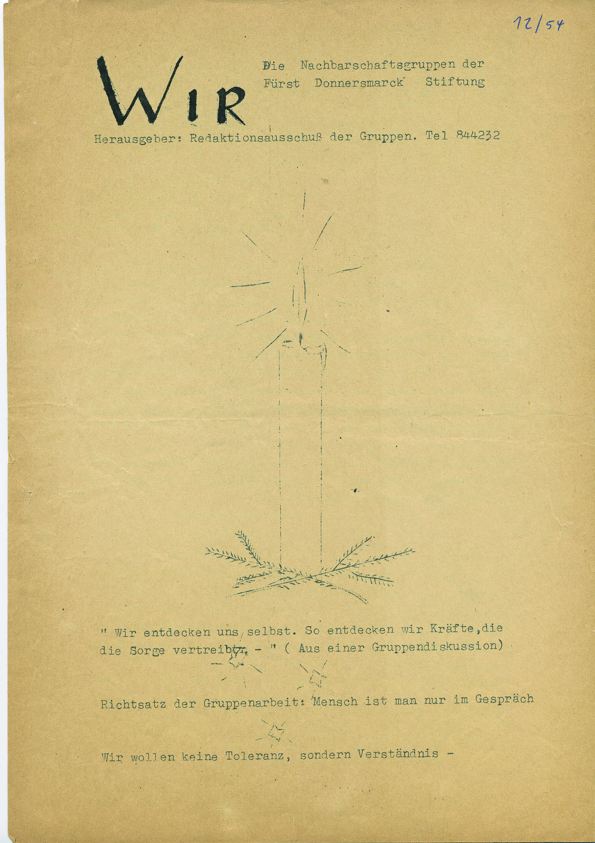 Wir Magazin No. 1